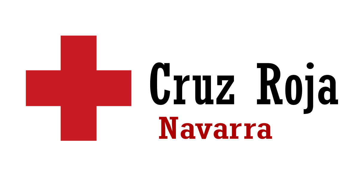 Cruz Roja Navarra (recreación aproximada)